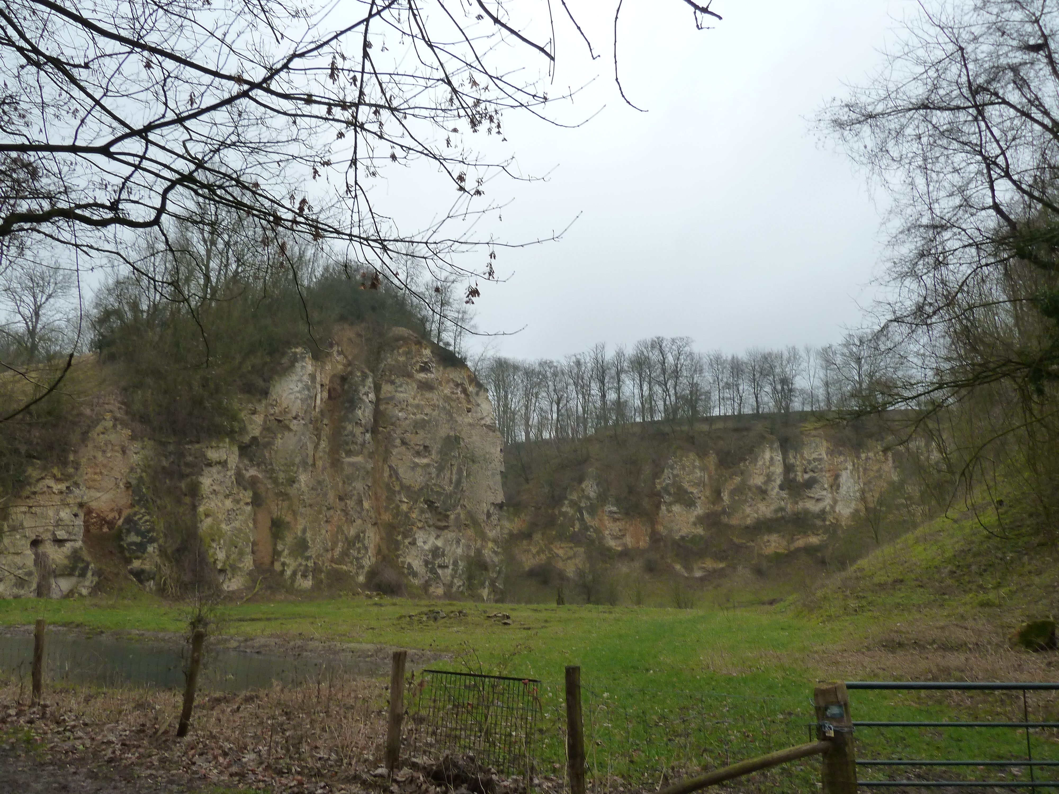 Julianagroeve, Cadier en Keer, Nederland